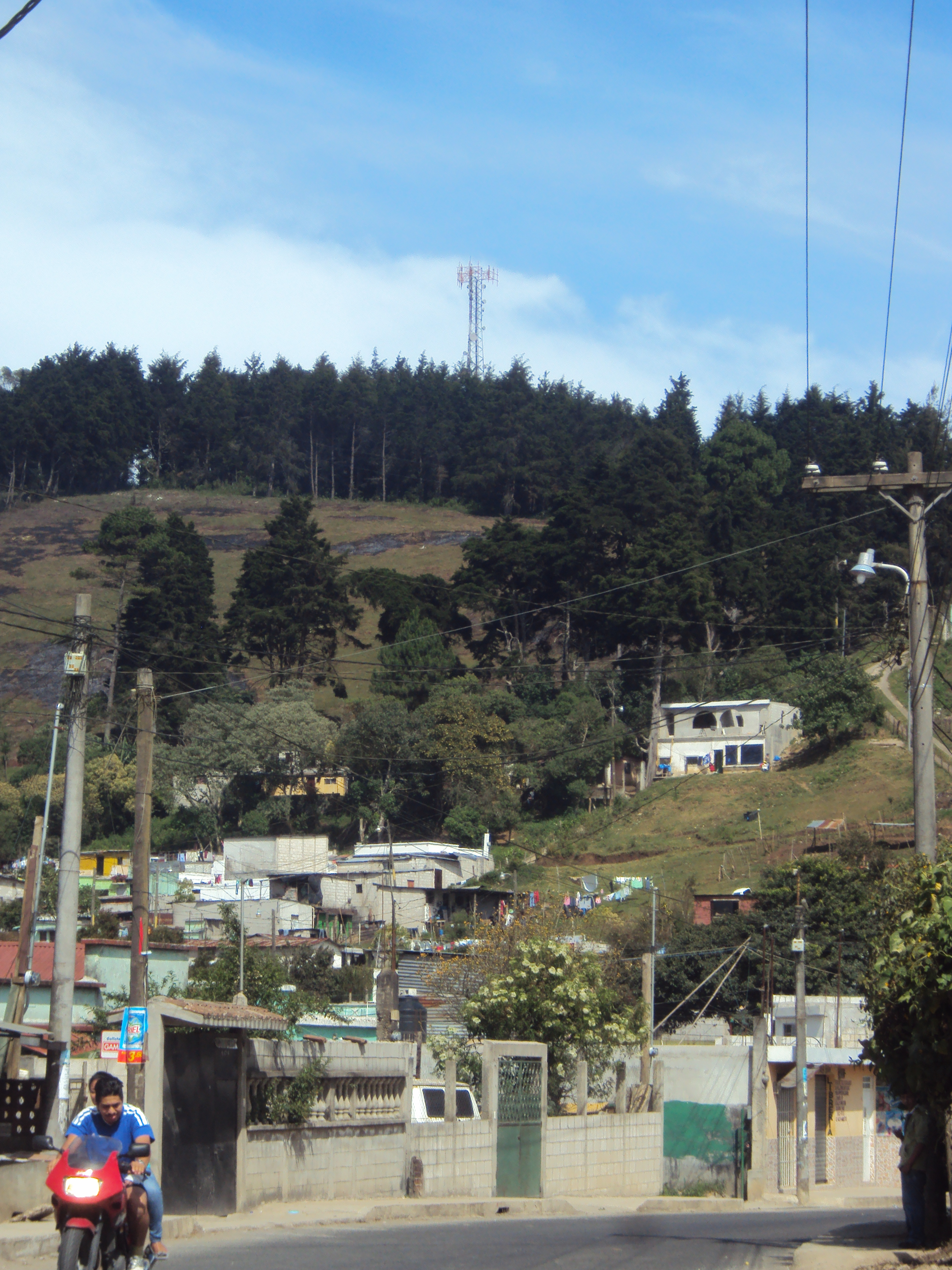 Fotos de pobreza en la zona de el pajon San jose Pinula